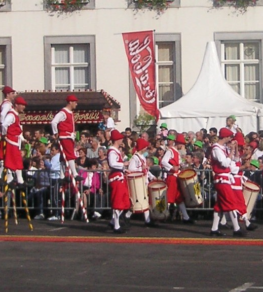 Entrée des échasseurs, Namur